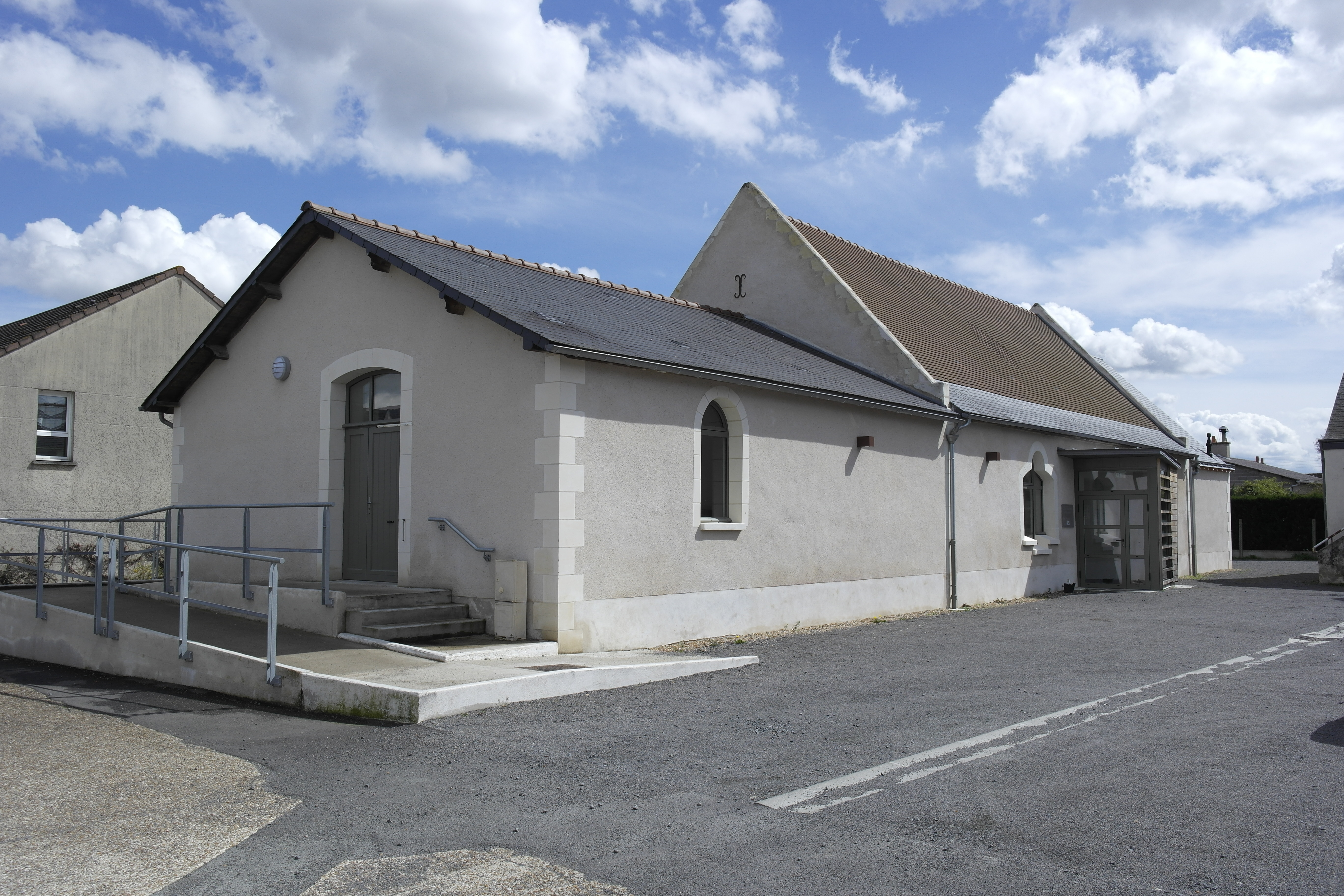 L'ancien presbytère (aujourd'hui salle Louis-Renard) de La Ville-aux-Dames